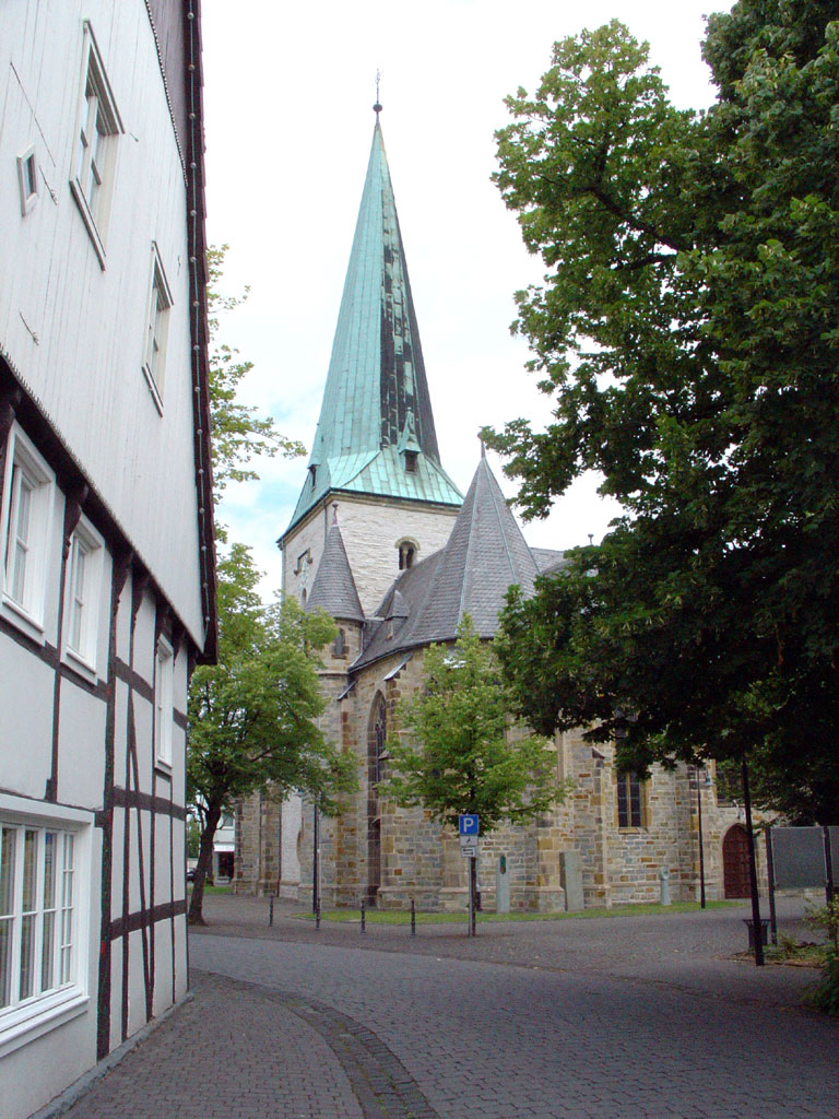 St. Lambertus und St. Laurentius Langenberg (katholisch)